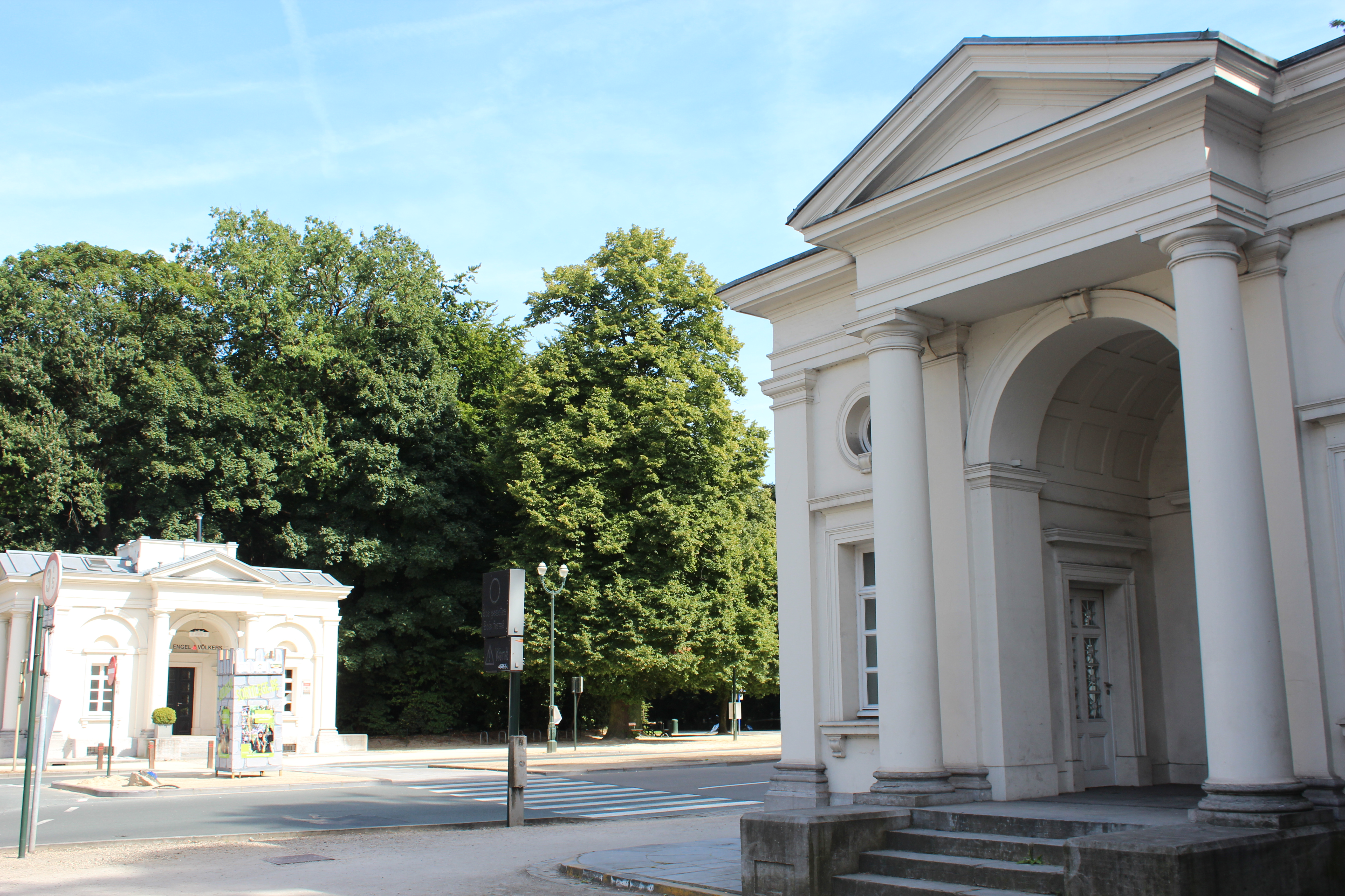 Oktrooipaviljoenen van de voormalige Naamse Poort in Brussel (hoek Louizalaan Ter Kamerenbos).